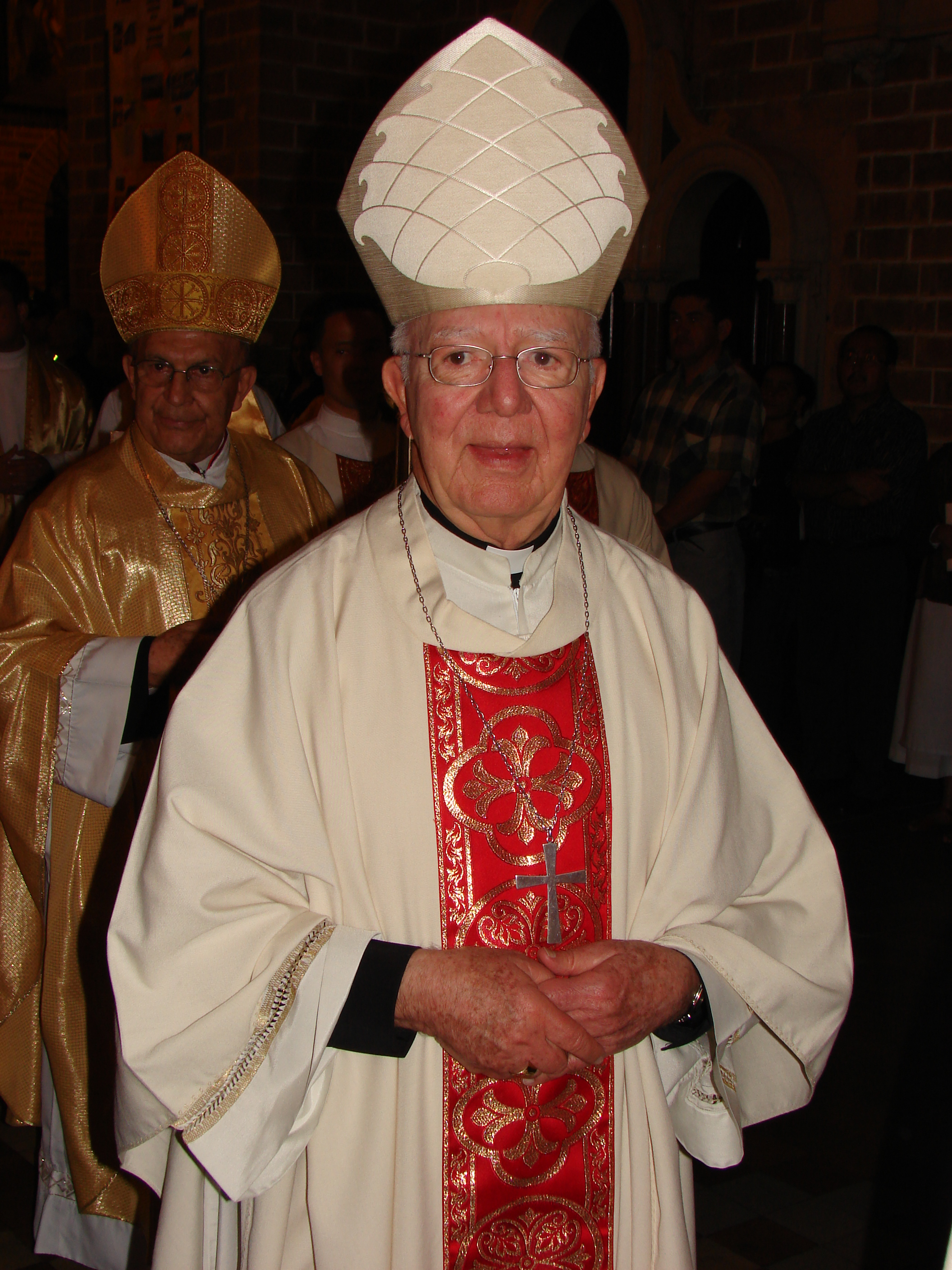 Pedro Rubiano Sáenz, cardenal y arzobispo emérito de Bogotá. Colombia.